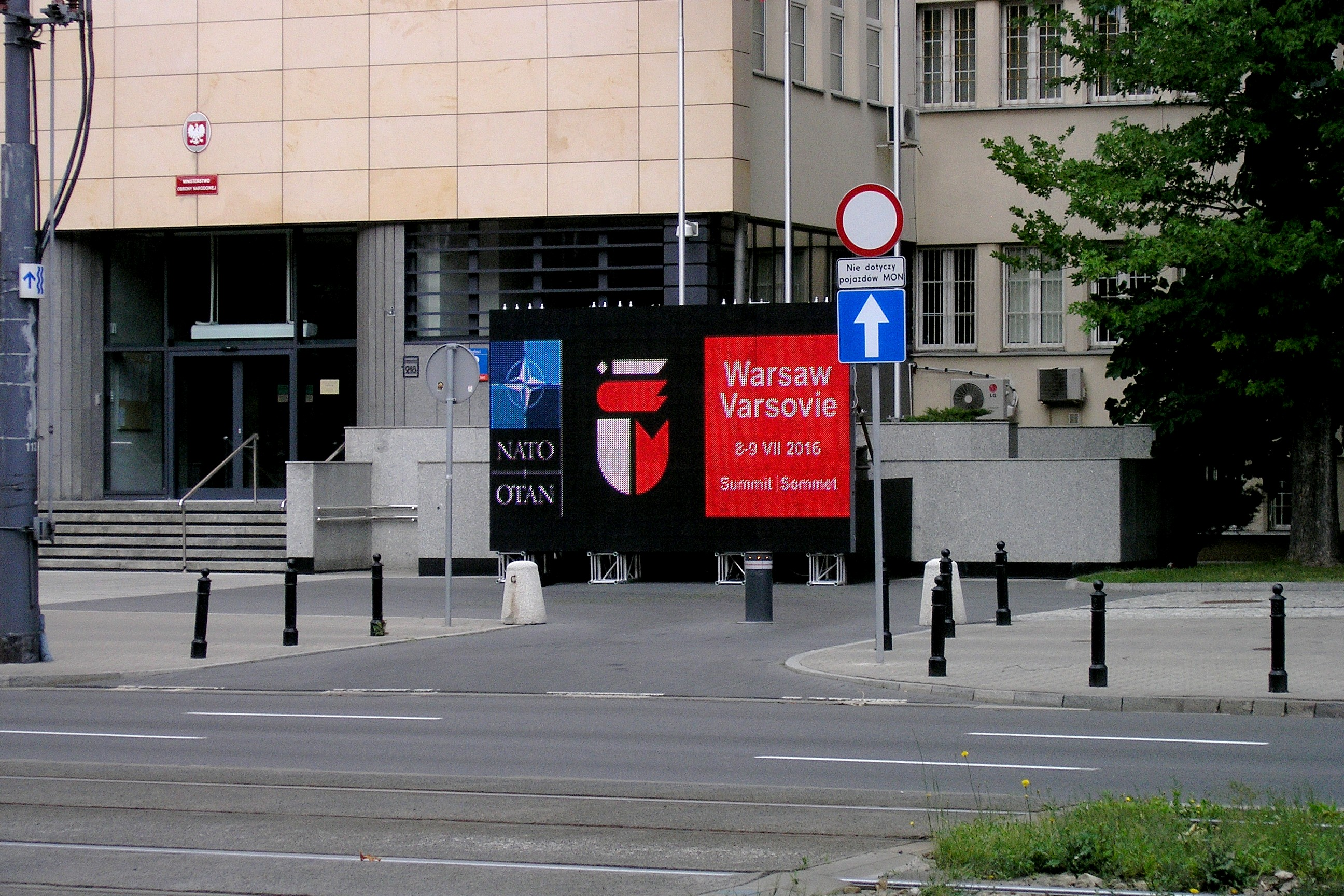 Informacja o Szczycie NATO w Warszawie (2016) na telebimie przy wejściu głównym do gmachu Ministerstwa Obrony Narodowej RP, przy al. Niepodległości 218 w Warszawie